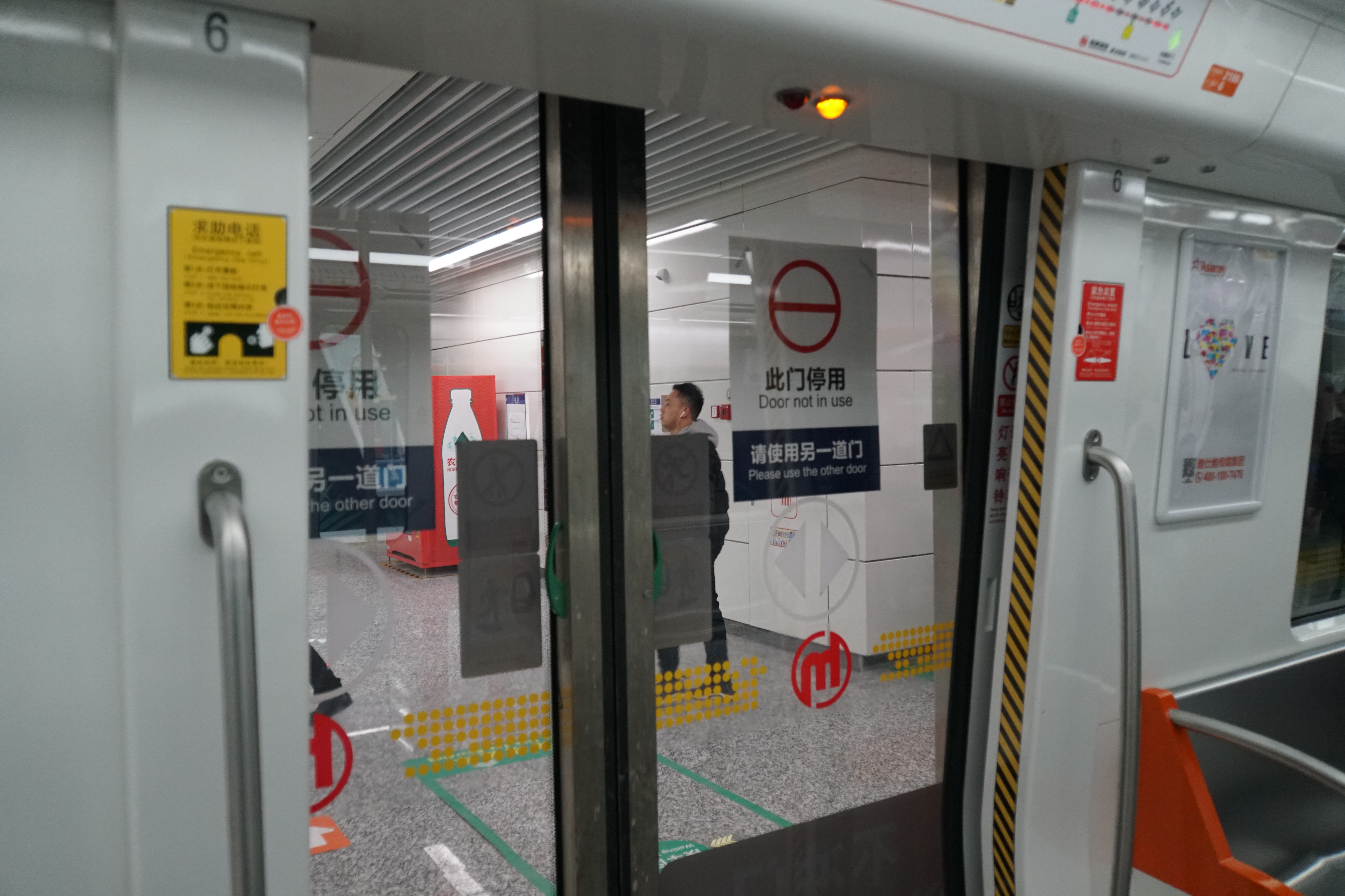 良渚站屏蔽门故障